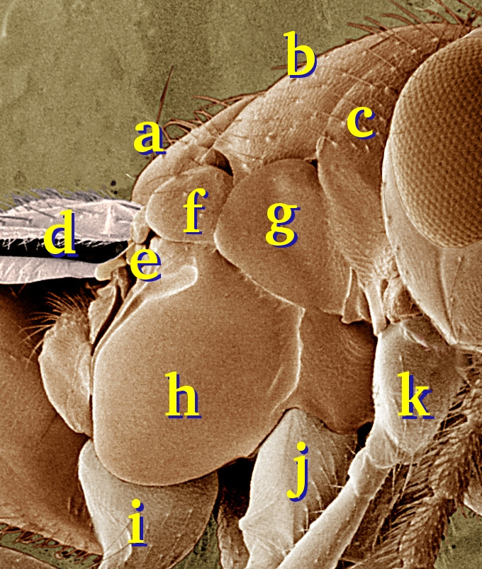 see legend below